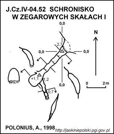 Schronisko w Zegarowych Skałach I - plan